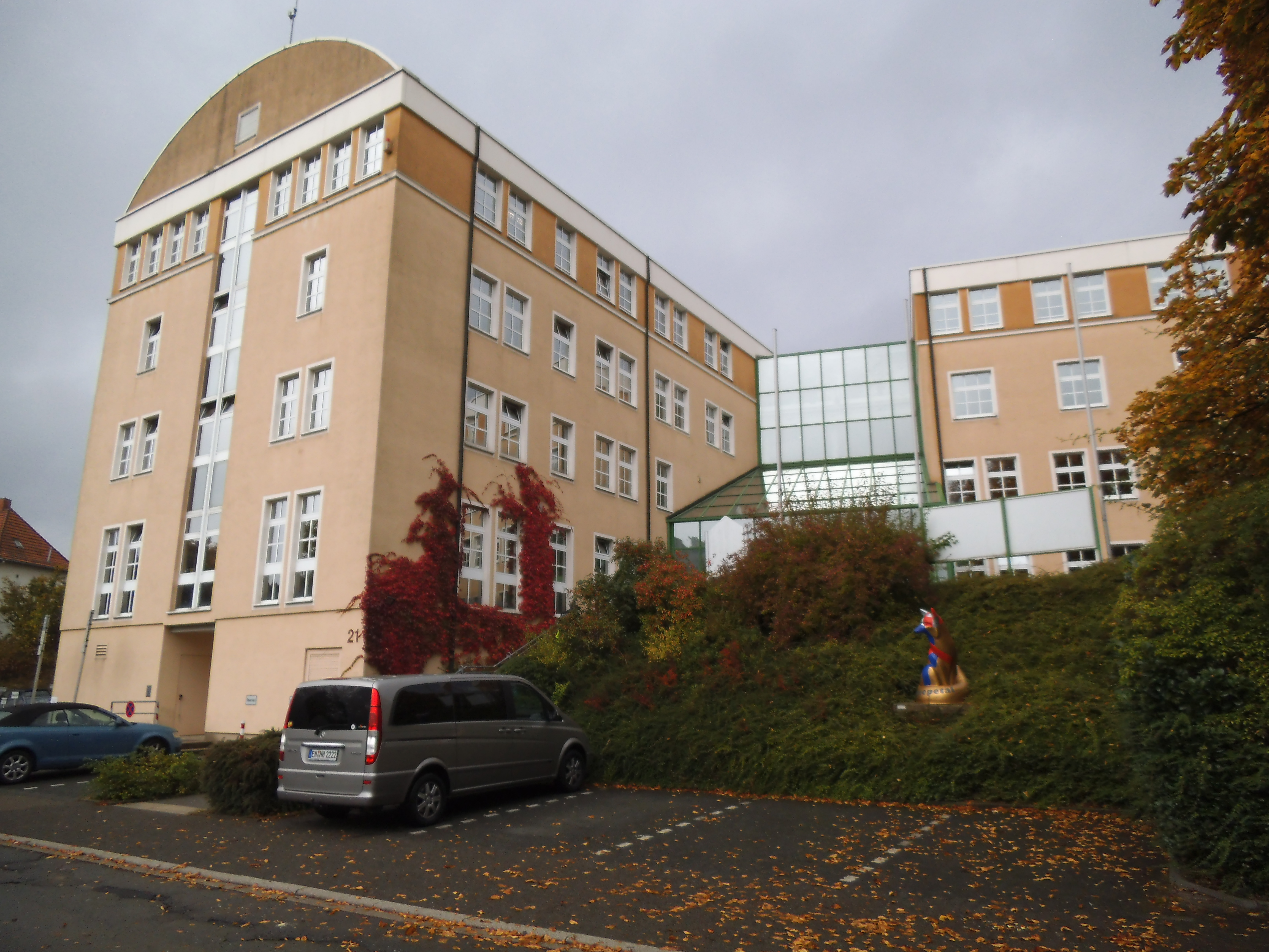 Neues Rathaus Ennepetal am 9. Oktober 2013